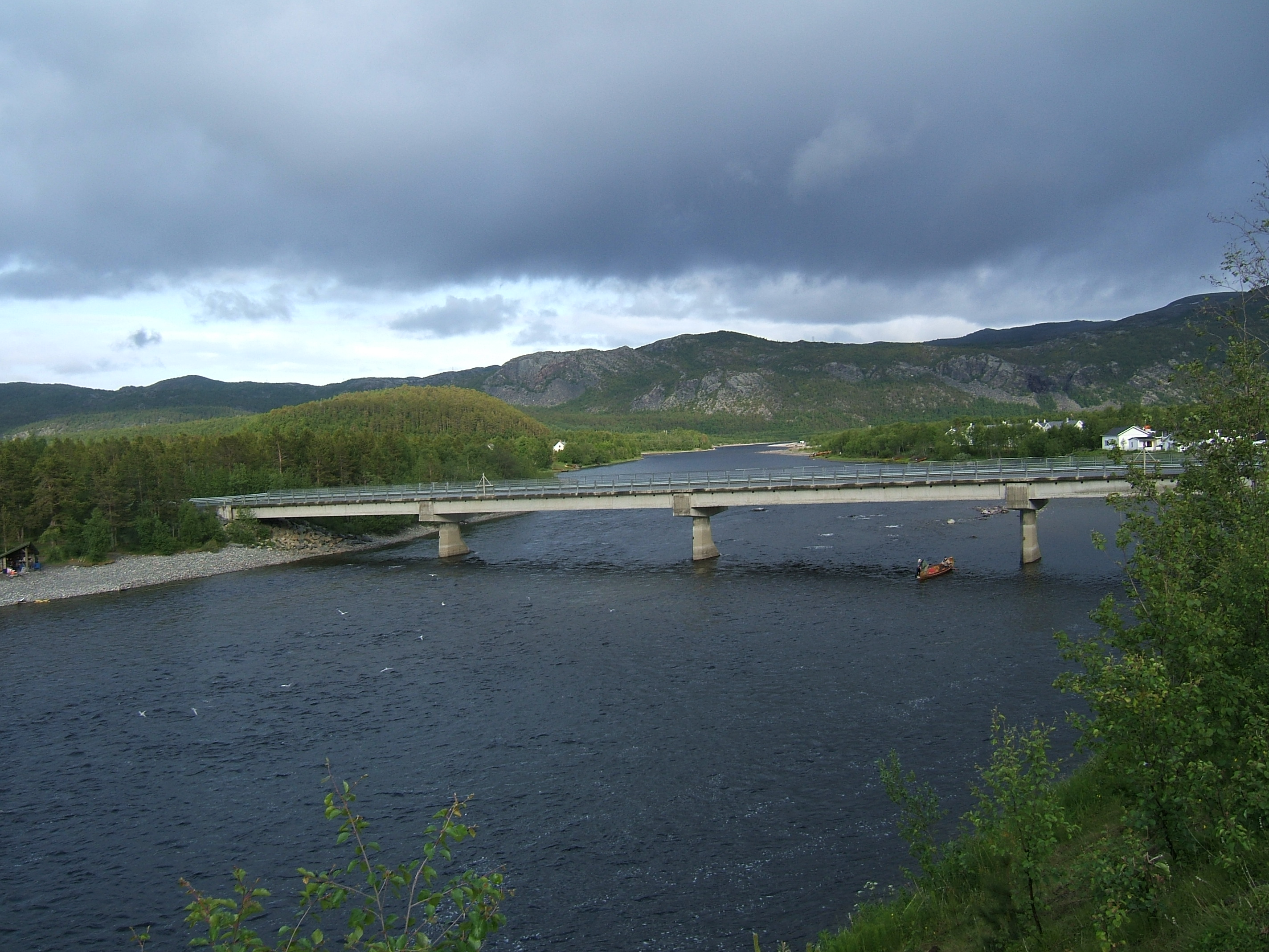 Bridge over Altaelva river at Leirbakken in Alta. The road is fylkesvei 15. Original description: Bridge over Alta river